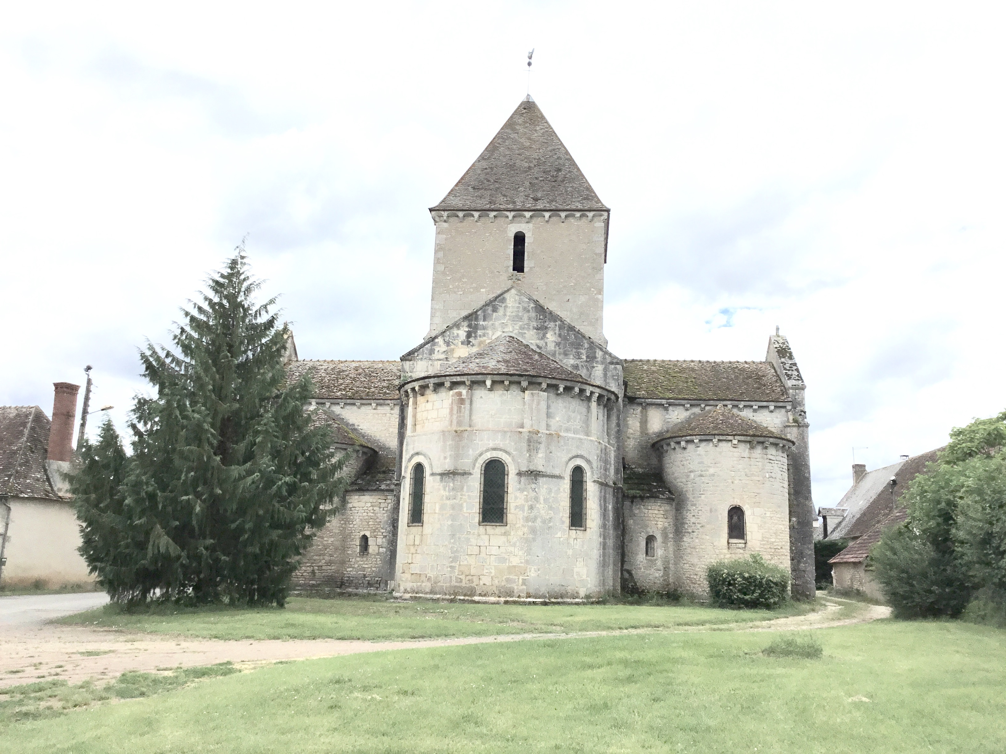 Eglise d'Ineuil